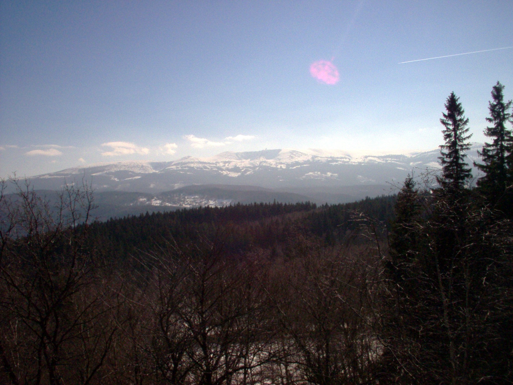 Widok z Bobrowych Skał na Karkonosze, Dolny Śląsk, Polska. View from Bobrowe Rocks on Karkonosze Mountains, Lower Silesia, Poland.